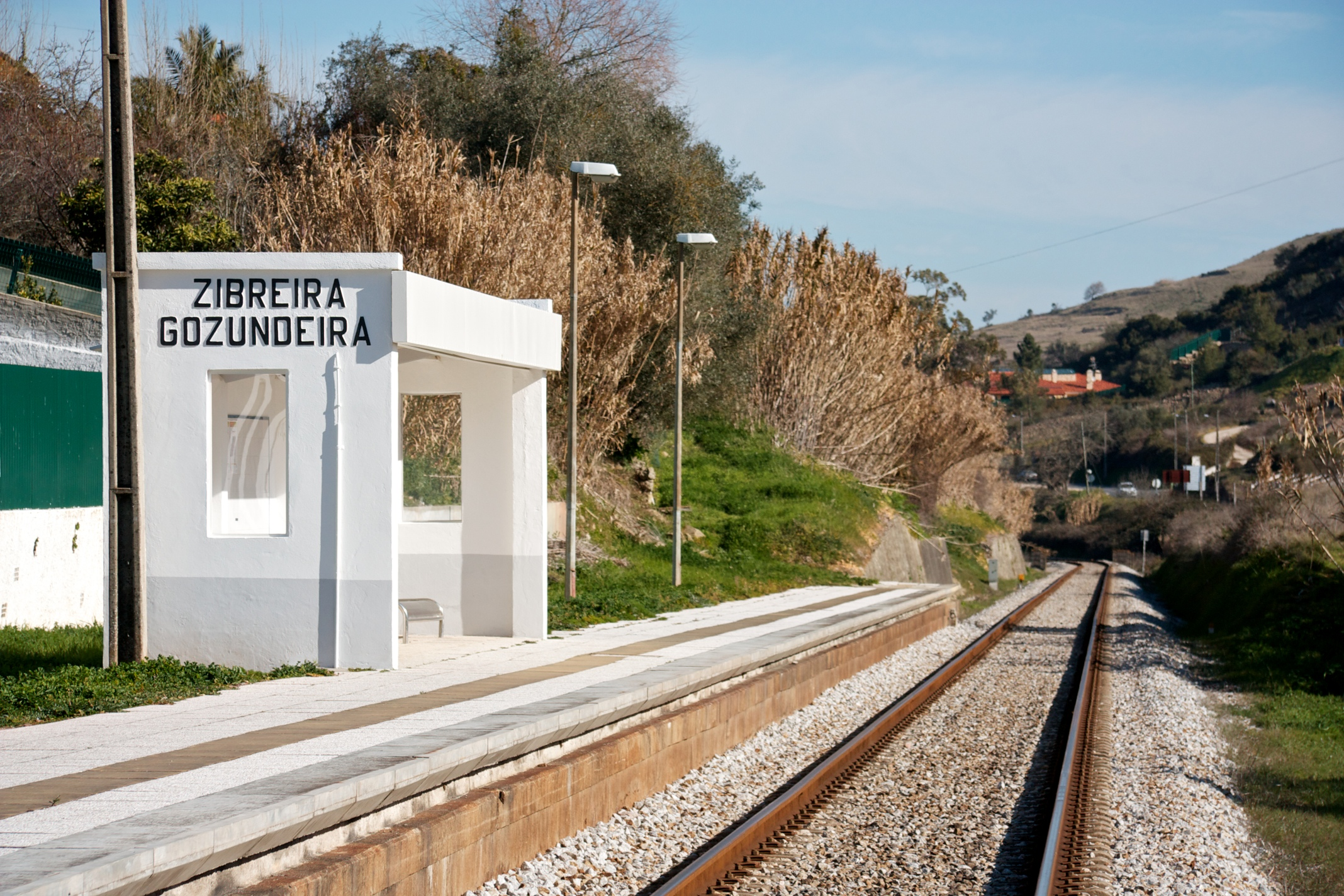 Tipo: A Apeadeiro Local: Zibreira [Linha do Oeste, PK 50] Data e hora: 24 de Fevereiro de 2012 [10h15]